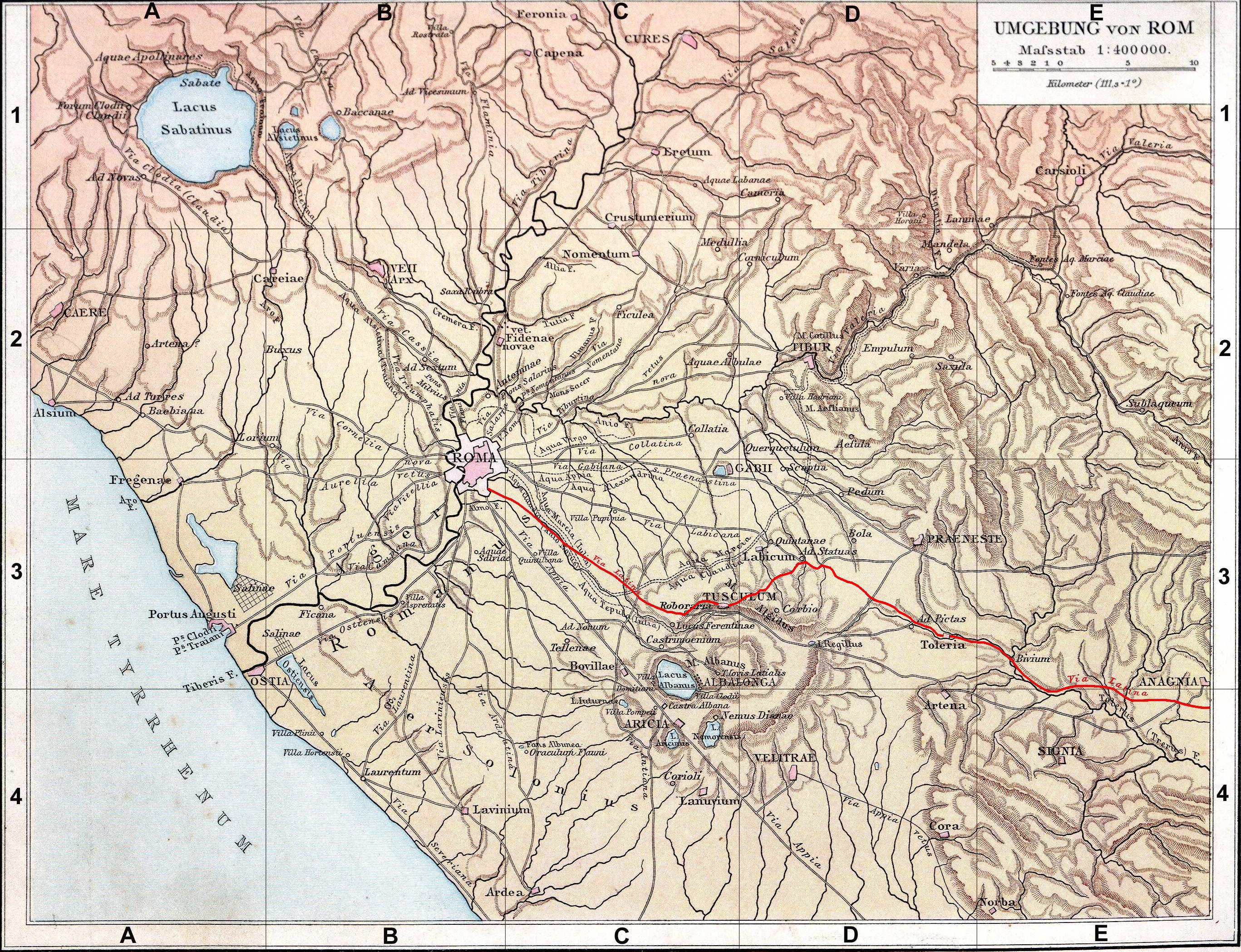 Fond de carte de 1886 (G. Droysens Allgemeiner Historischer Handatlas), libre de droit (Image:Rom_Umgebung.jpg), avec la voie Latine en rouge.